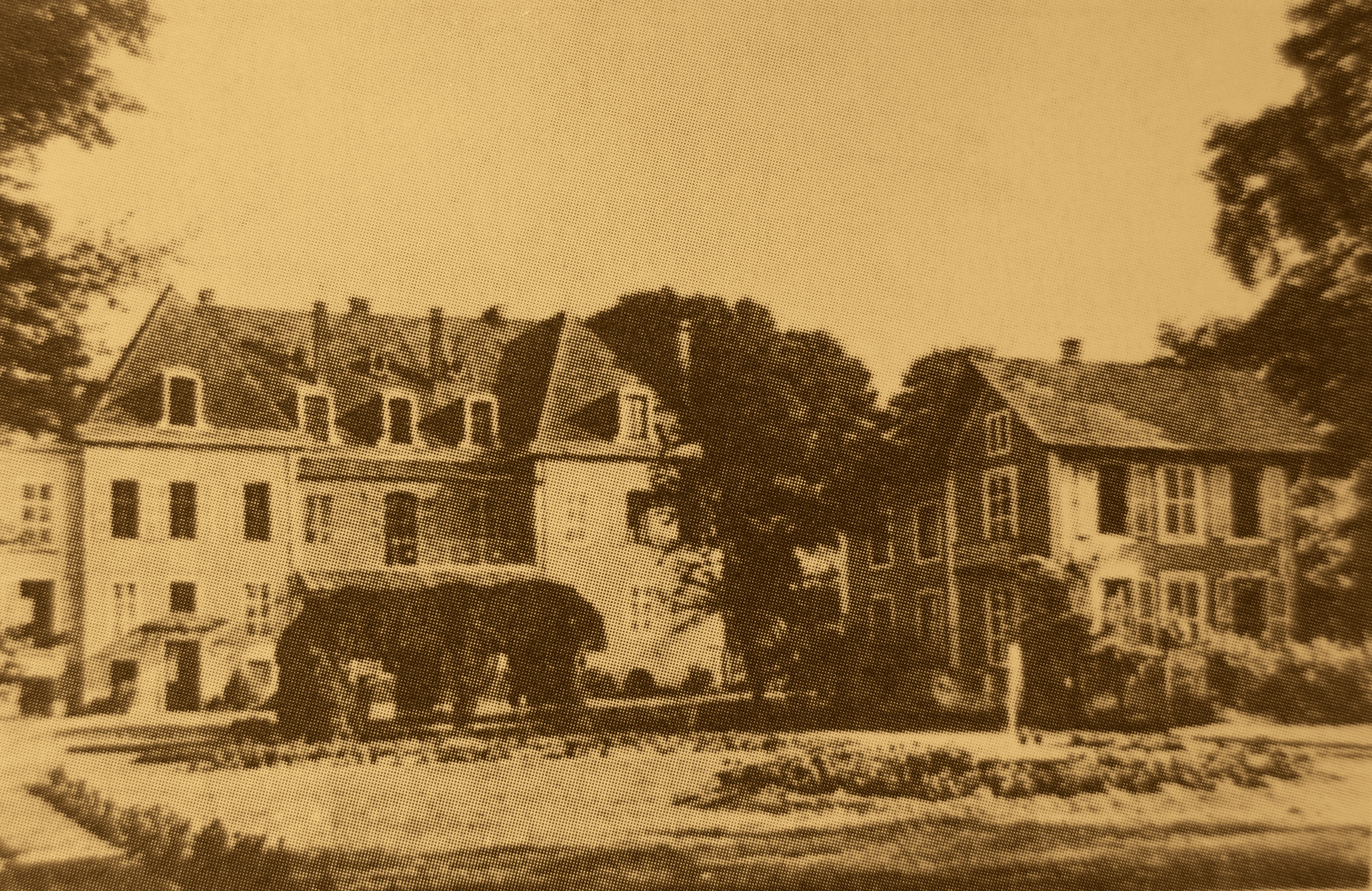 Wallerfangen, Schloss von Papen, Vorkriegszustand (Gemeindearchiv)